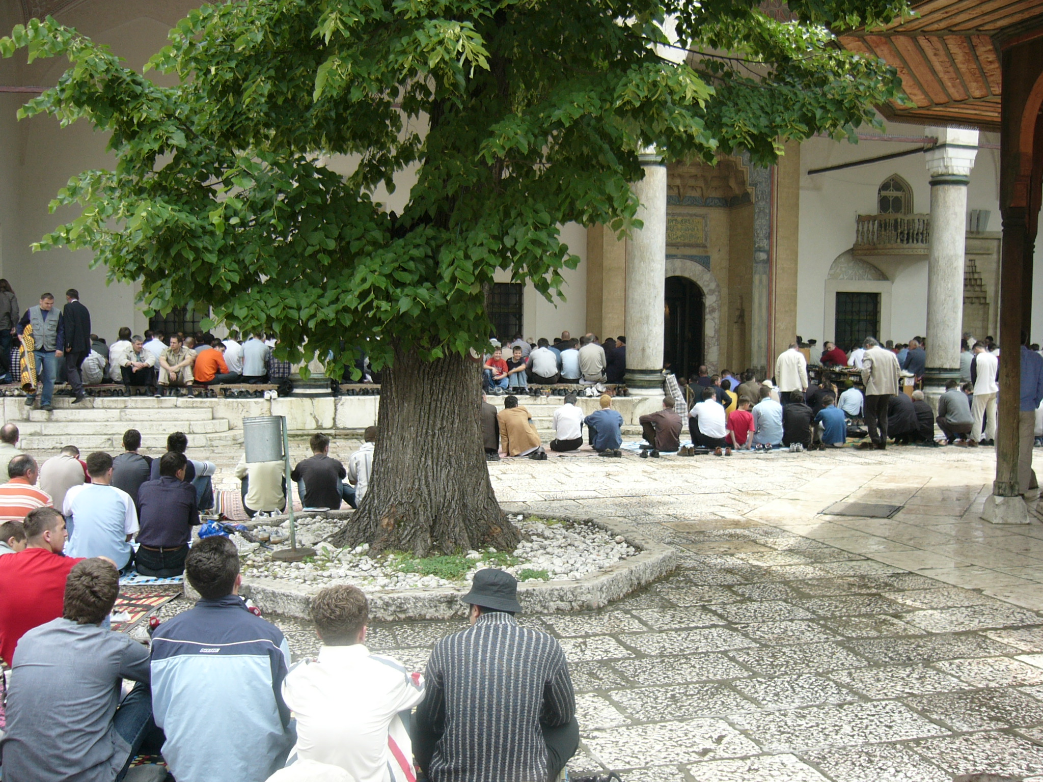 Gazi Husrev-beg's Mosque